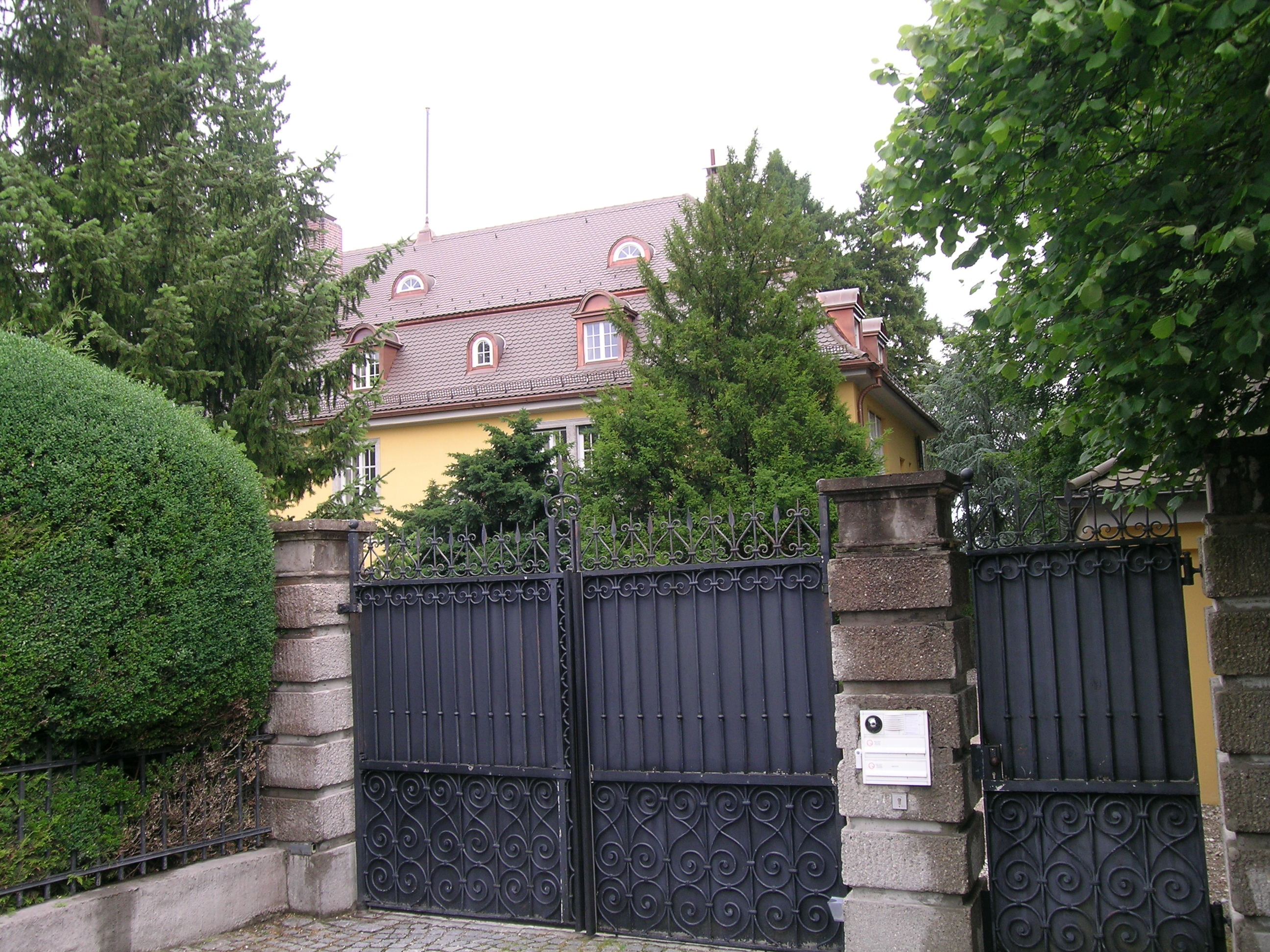 Tutzing Villa Graf Stolberg (Mächtiger Mansardwalmdachbau, neuklassizistisch, von Architekt Ludwig Bauer, 1926/28, im Nordteil Kernbau der ehemaligen Villa des Staatsrates von Heintz erhalten, 1863; mit Parkanlage, Terrassen an der Seeseite und Einfriedung an der Hauptstraße., Hauptstraße 84; 86)